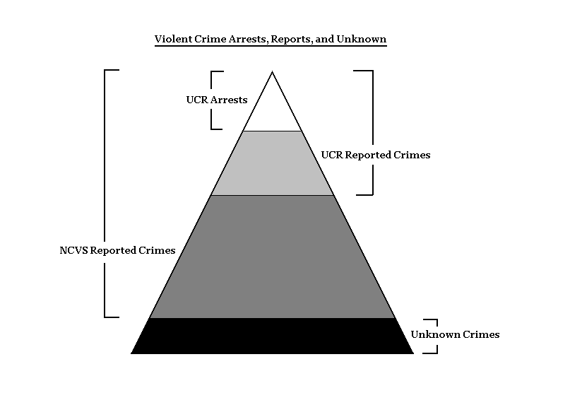 UCR NCVS Violent Crime Comparison